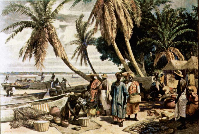 Togoland